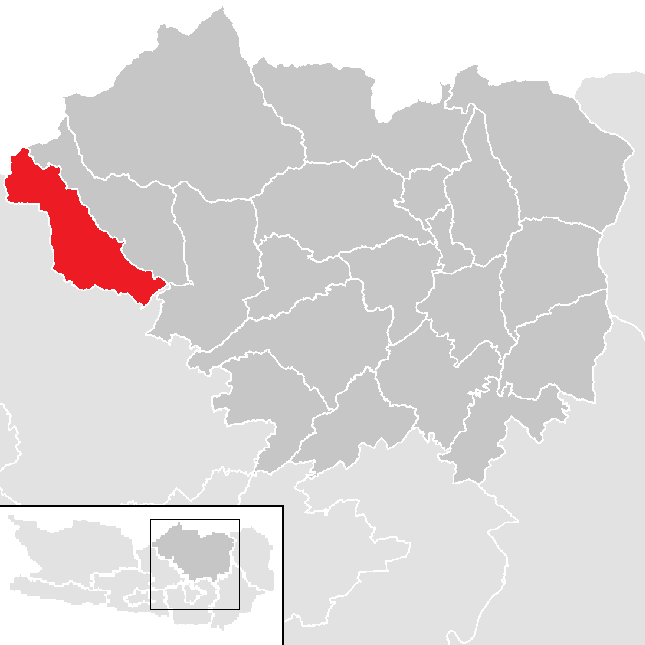 Bezirk Sankt Veit an der Glan